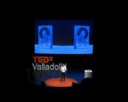 Solimán López, le fondateur du musée Harddiskmuseum lors d'une conférence ou il explique son concept.